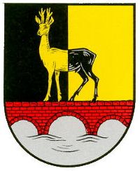 Wappen von Rehweiler